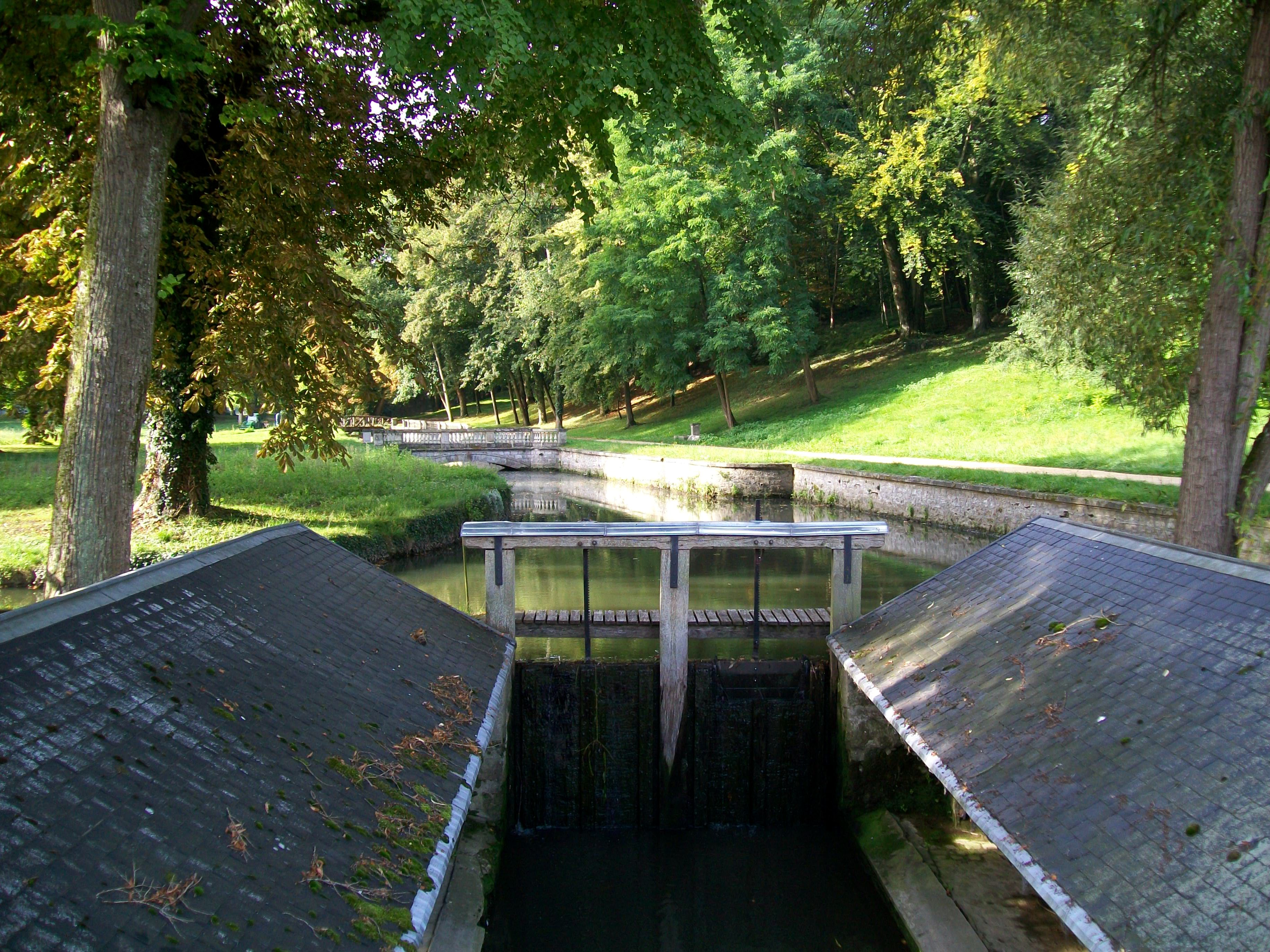 Le lavoir couvert entre la chausée et le parc; vue sur le premier tableau du Grand Parc.